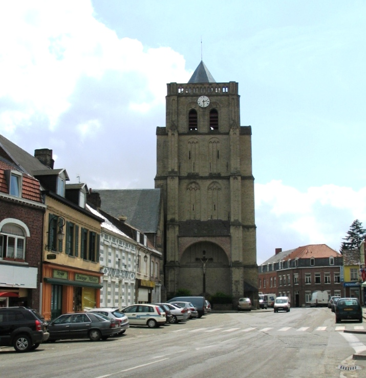 Kerk te Wormhout